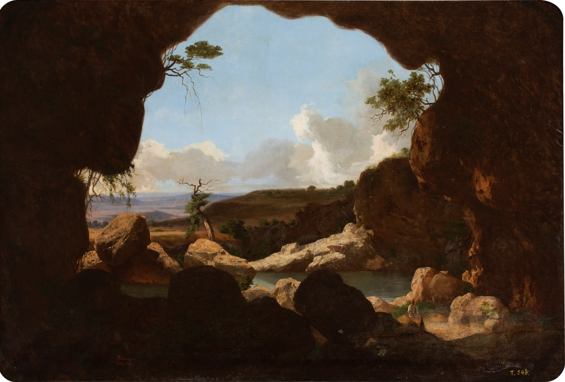 La obra representa la Cueva de las Palomas de Valencia, (España).